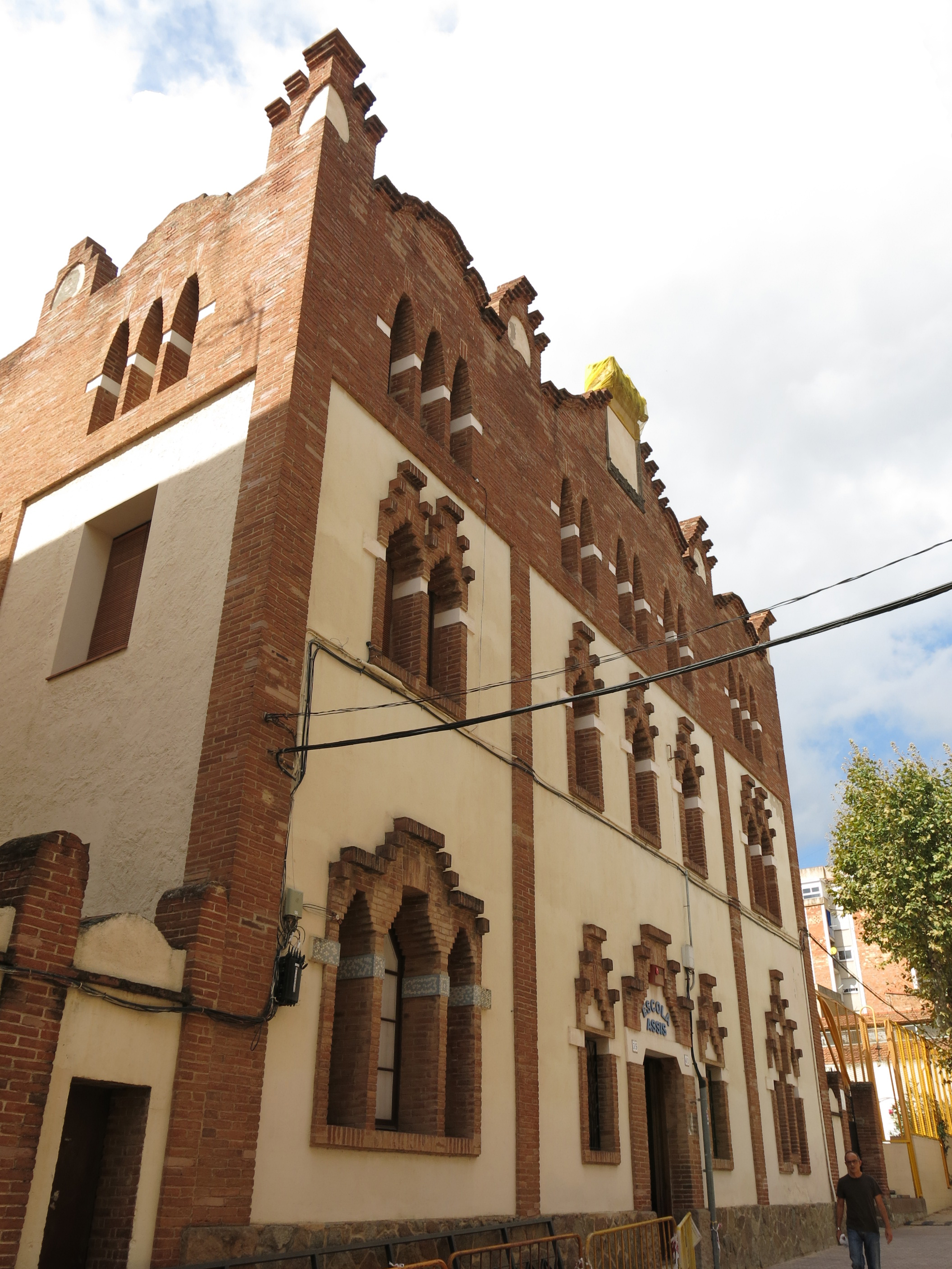 Escola Divina Pastora (Premià de Mar)